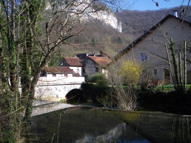 La rivero Cuisance ĉe Les_Planches-près-Arbois.